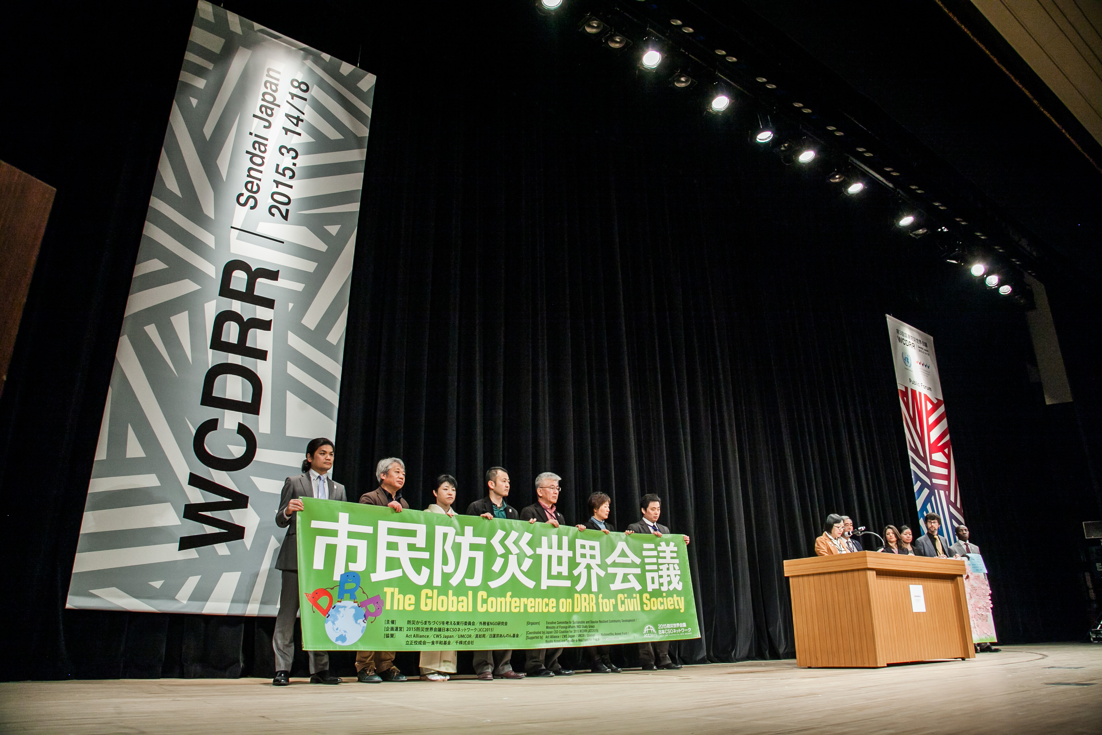 国連防災が異議のサイドイベントの様子。